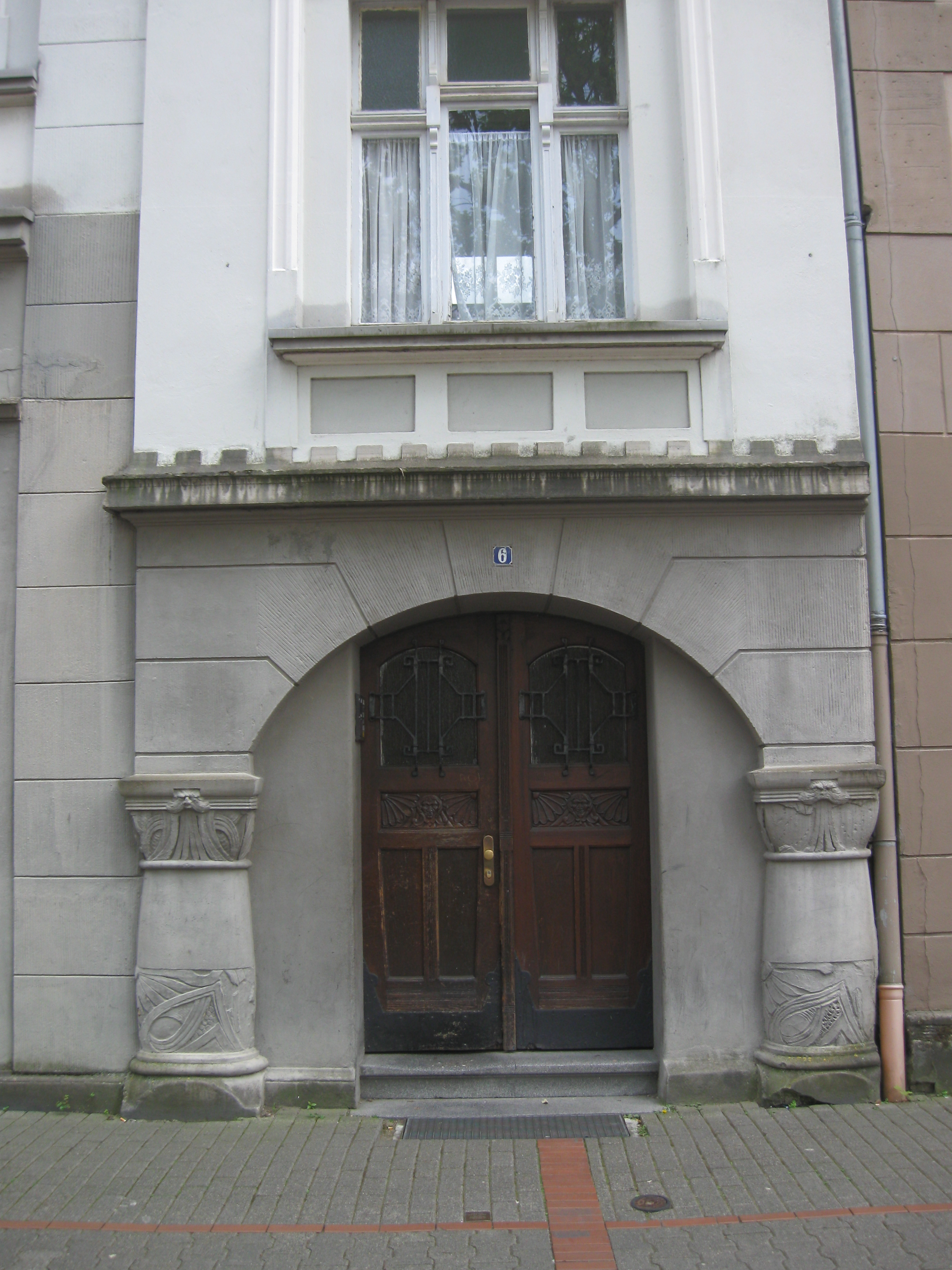 Denkmalgeschütztes Eckwohnhaus am Neustadtplatz 6 (früher Moltkeplatz 6), Jugendstil Hauseingang mit Stolperstein für Helene Lewek (1881-1942).